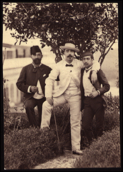 Fotografía, copia positiva. Benigno de la Vega-Inclán (centro) y amigos en Puerto Rico.